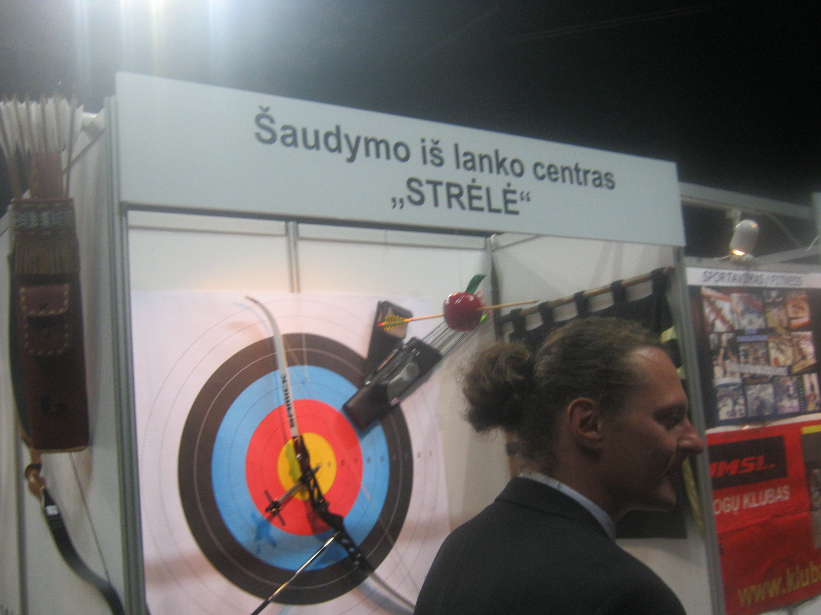 Vilnius Sports Fair 2012